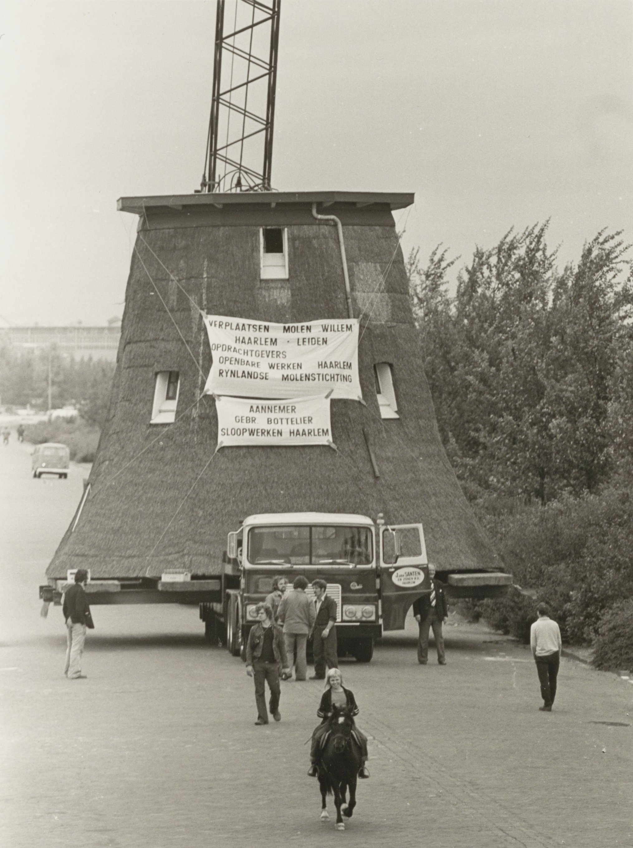 Molen "De jonge Willem" tijdens het transport op de Waarderweg naar de grote Sloot bij Warmond.